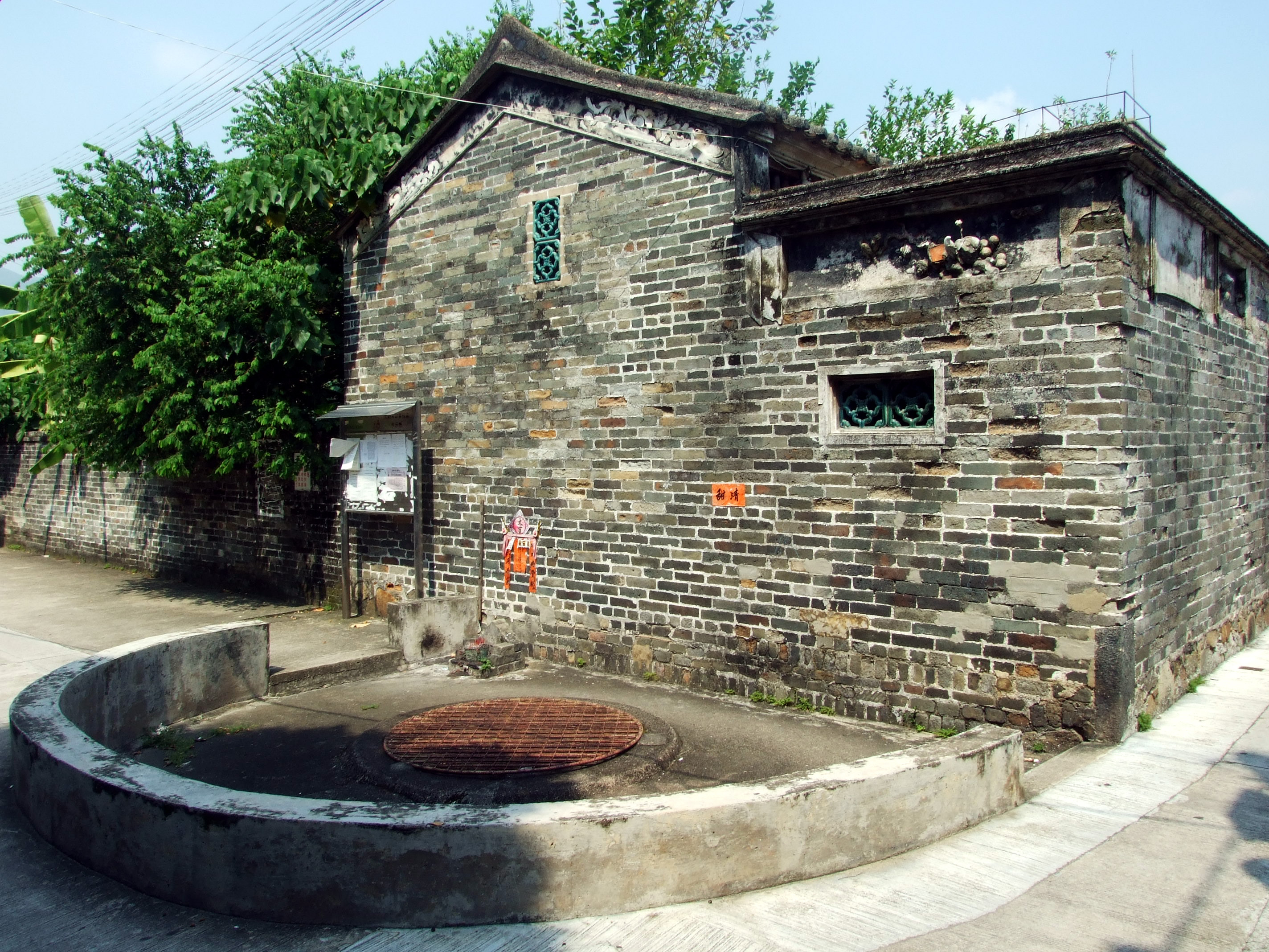 中文（香港）: 鄧伯裘故居